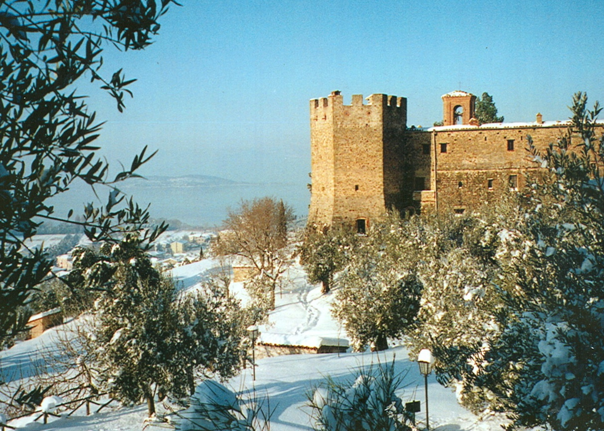 Badia di Sant Arcangelo, Winter